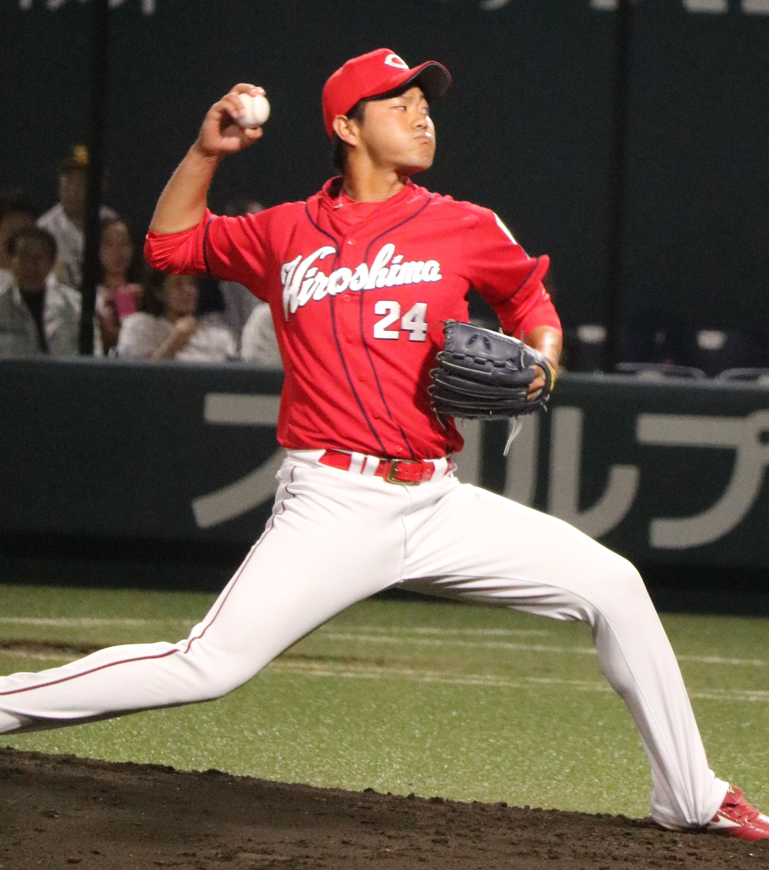 2017/6/21 ウエスタンリーグ(タマホームスタジアム筑後)にて